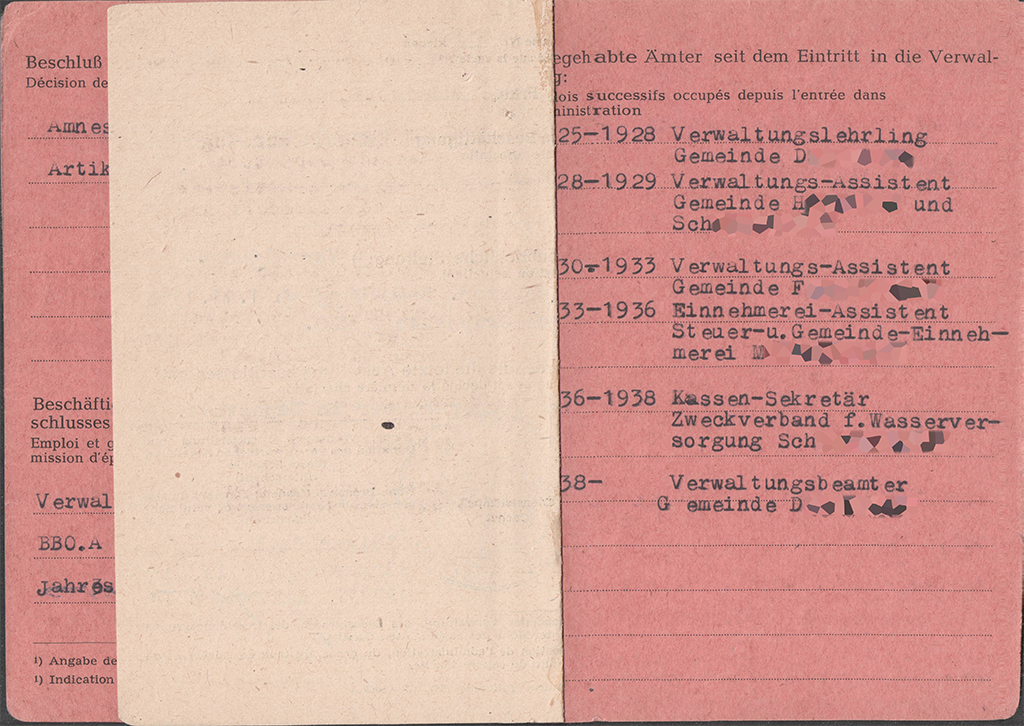 Immatrikulationskarte der Beamten, hier für einen Kommunalbeamten in Rheinland-Pfalz, mit Vermerk der Entscheidung der französischen Bereinigungskommission (Entnazifizierung). Klappkarte mit Einlegeblatt, Rückseite..